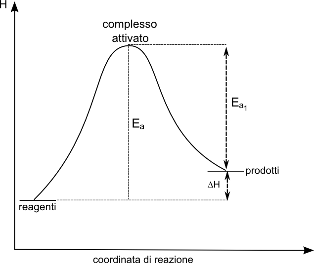 Profilo energetico di una reazione chimica.